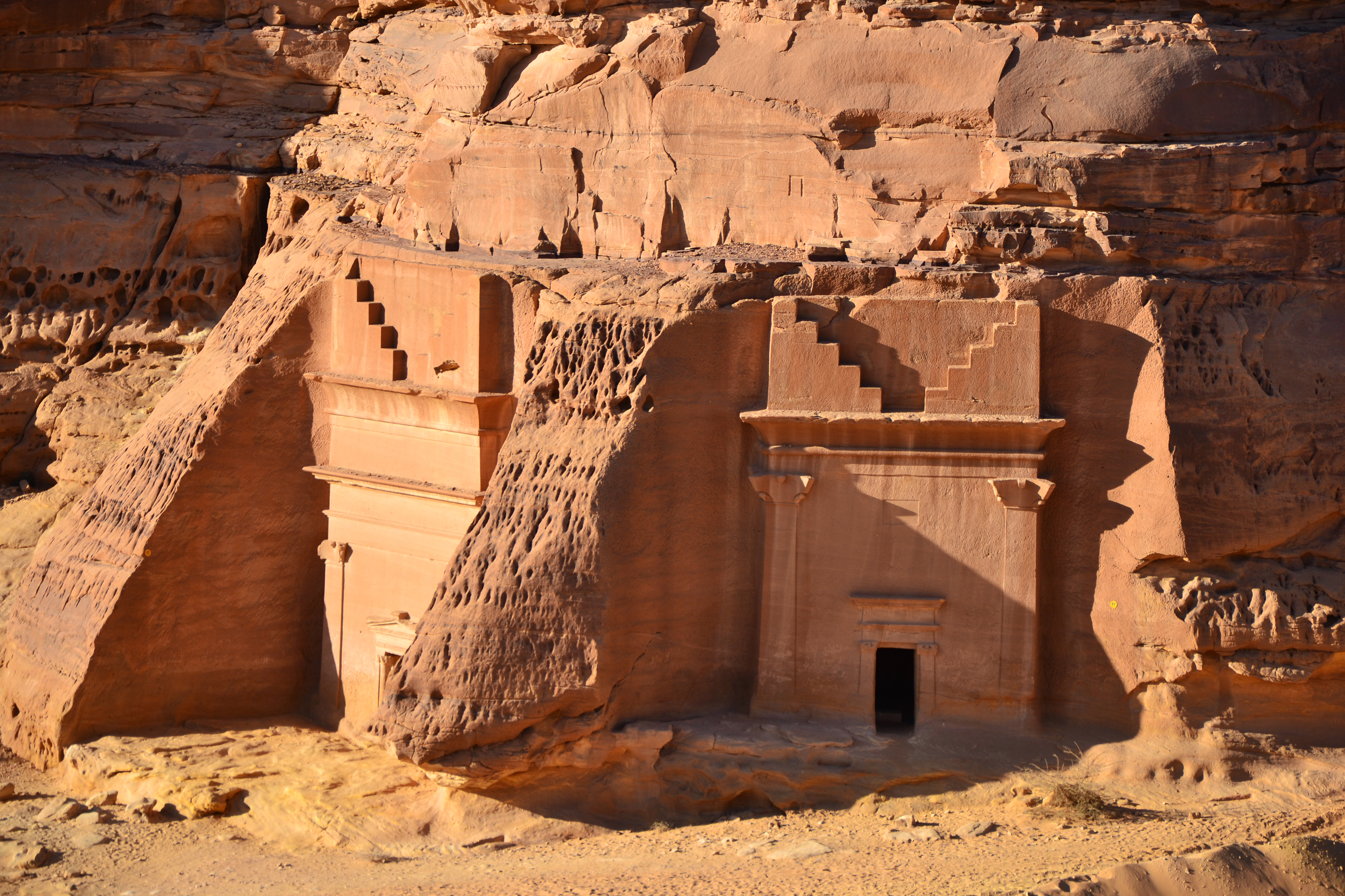 Khuzaymat منطقة الخريمات جنوب غربي الحِجْر، وتحتوي على 53 مدفناً موزعة على تسعة جبال. مدافن واقعة ضمن منطقة الخريمات.